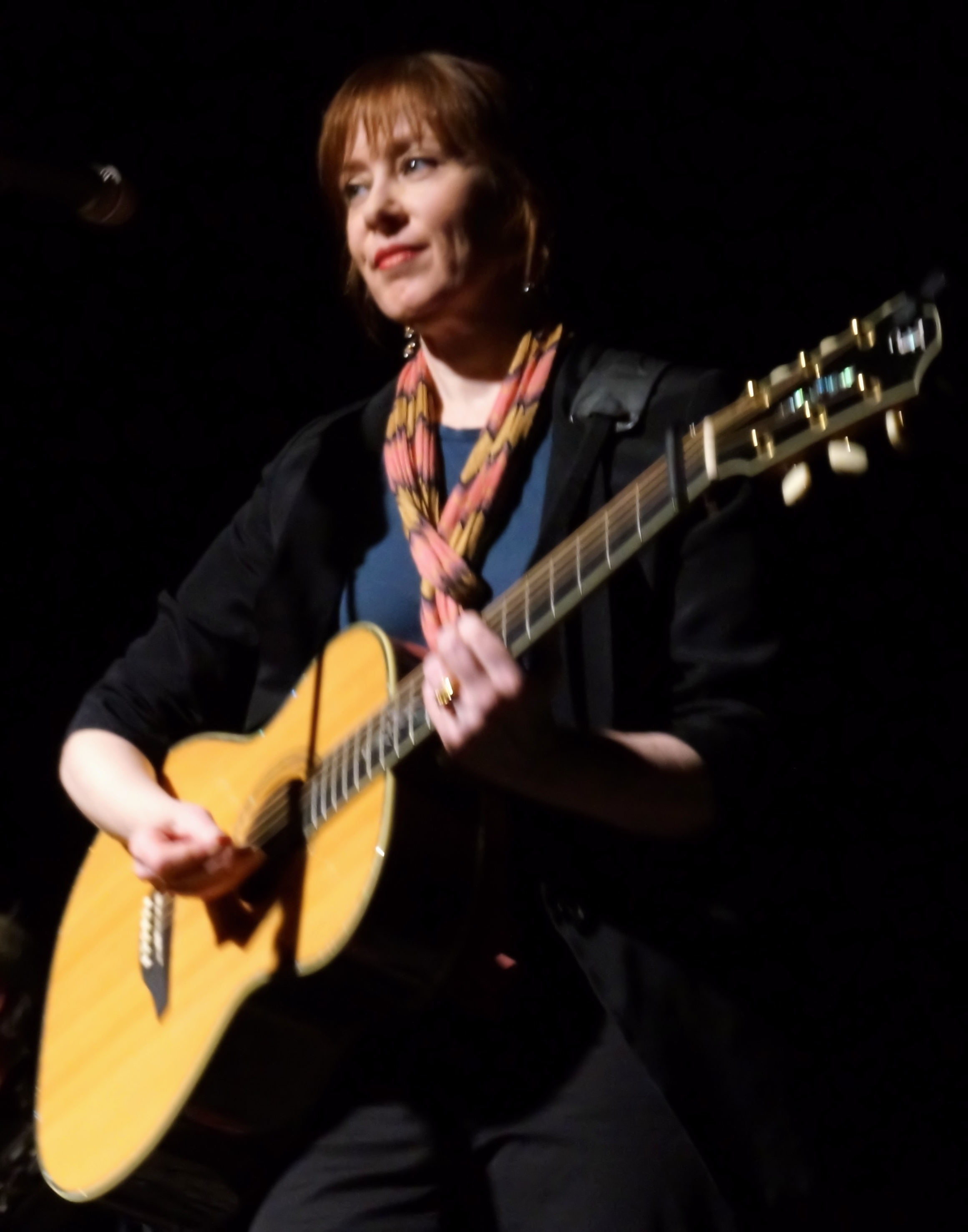 Susanne Vega im Münchner Freiheiz im Februar 2014 im Rahmen ihrer Club-Tour Tales from the Realm of Queen of Pentacles